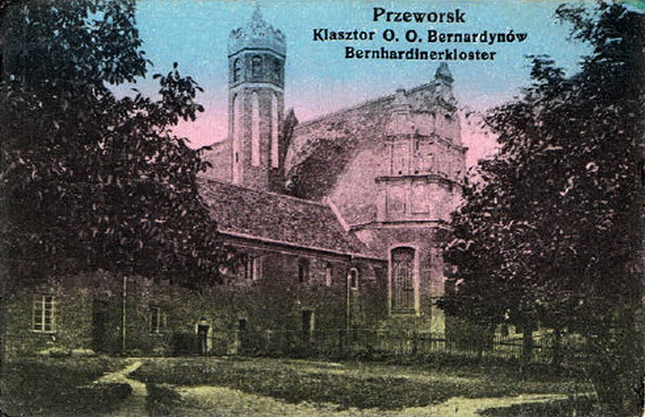 Klasztor oo. Bernardynów w Przeworsku - fot. archiwalna